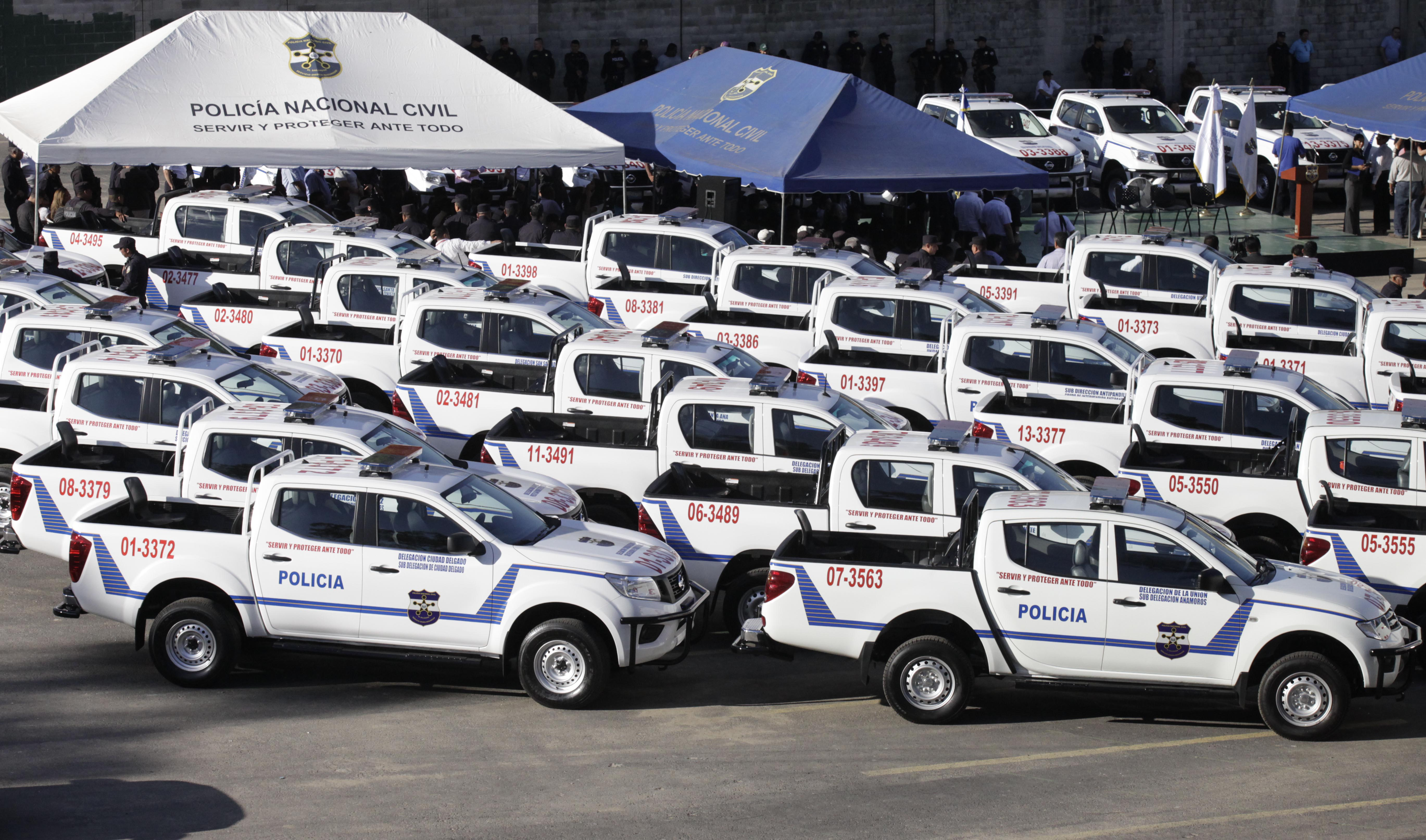 El Ministerio de Justicia entregó 40 patrullas y 50 motocicletas ala Delagaciones y Subdelegacions de la PNC en todo el pais.